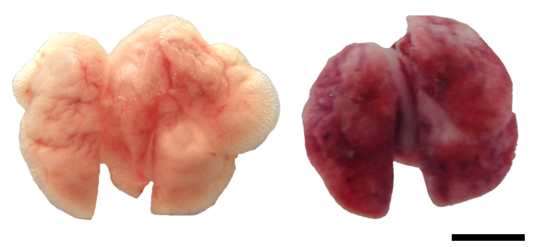 Makroskopická patologie plic (3. den po infekci) myši infikované ptačími motolicemi Trichobilharzia szidati (Schistosomatidae) s viditelnými povrchovými lézemi (vpravo) v porovnání s plícemi neinfikované myši (vlevo). Měřítko: 5 mm.